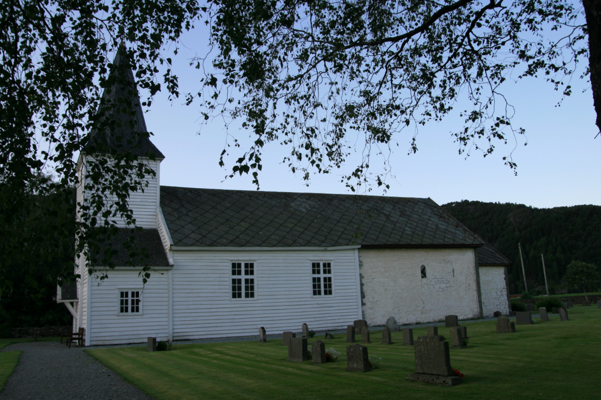 Stødle kyrkje